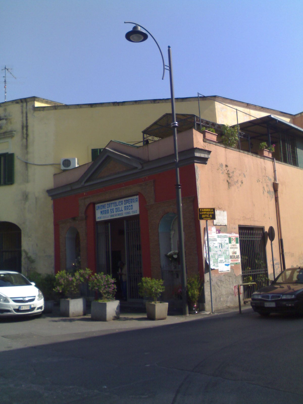 Chiesa di Santa Maria dell'Arco (Napoli, Ponticelli)